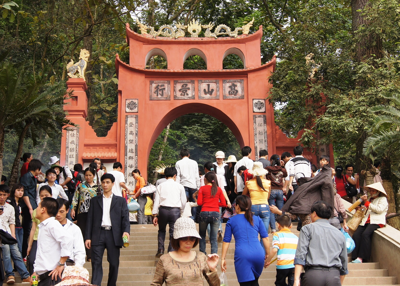 Cổng chính Đền Hùng, Phú Thọ